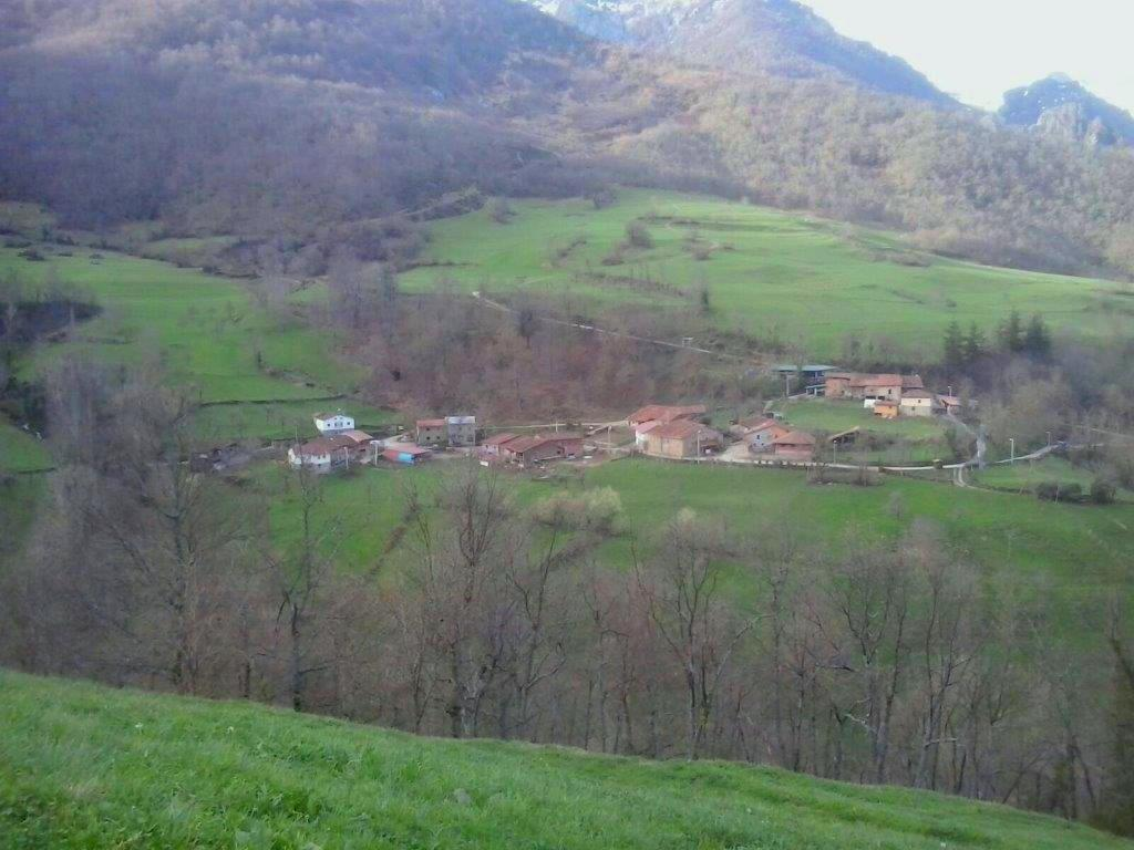 Bárago